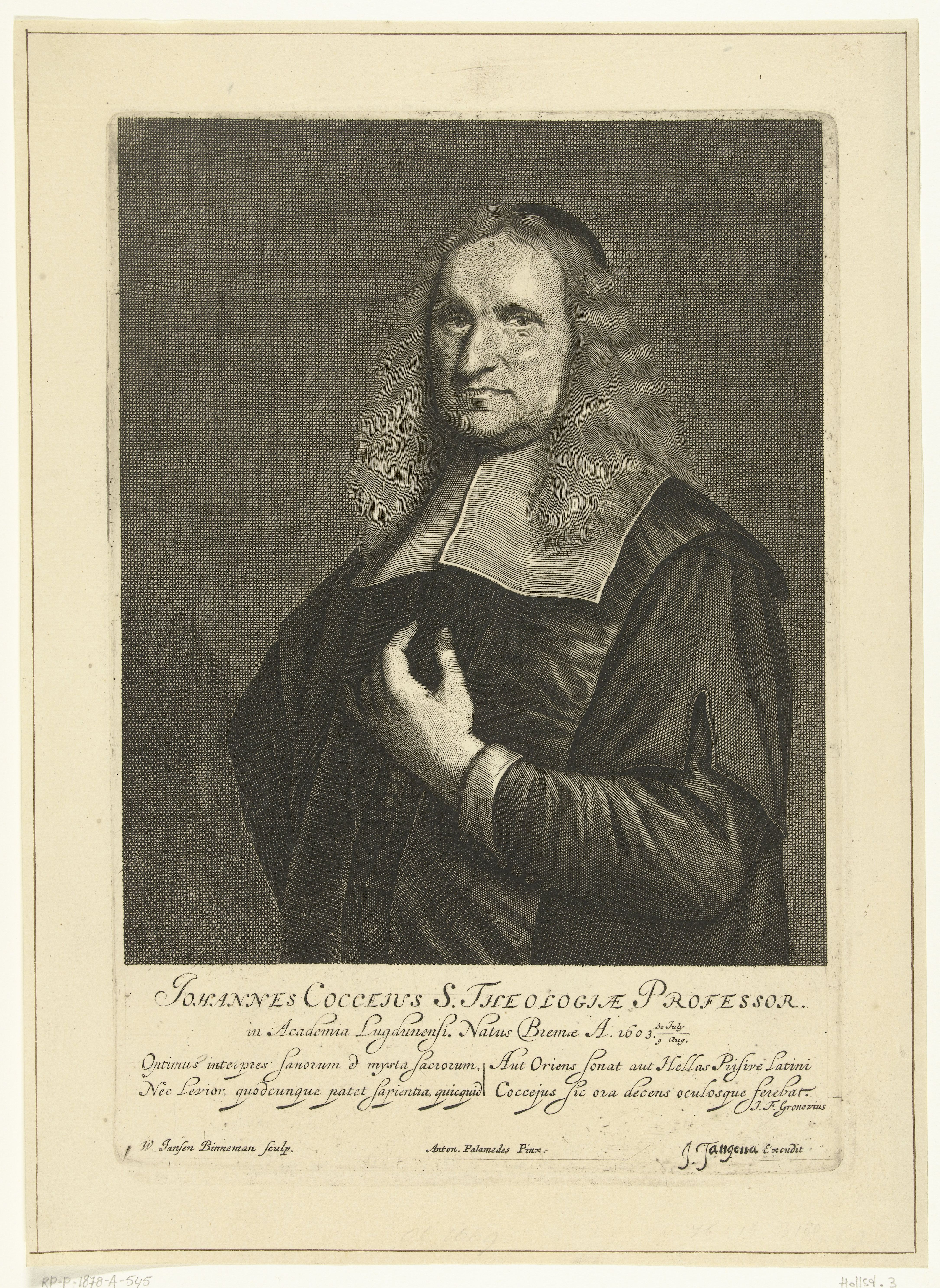 IdentificatieTitel(s): Portret van hoogleraar theologie Johannes CocceiusIohannes Cocceius S. Theologiae Professor (titel op object)Objecttype: prent Objectnummer: RP-P-1878-A-545Catalogusreferentie: Hollstein Dutch 3Opschriften / Merken: verzamelaarsmerk, verso midden, gestempeld: Lugt 2228Omschrijving: Portret van hoogleraar theologie Johannes Cocceius met Latijns vers van I.F. GronoviusVervaardigingVervaardiger: prentmaker: Wouter Jansz. Binneman (vermeld op object)naar schilderij van: Anthonie Palamedesz. (vermeld op object)uitgever: Johannes Tangena (17e eeuw) (vermeld op object)Plaats vervaardiging: NederlandDatering: 1668 - 1688Fysieke kenmerken: etsMateriaal: papier Techniek: etsenAfmetingen: plaatrand: h 272 mm × b 187 mmToelichtingPrent naar schilderij van Anthonie Palamadesz.OnderwerpWat: scholastic education, tuition (+ portrait of teacher, professor)Wie: Johannes CocceiusVerwerving en rechtenVerwerving: aankoop 7-jan-1878Copyright: Publiek domein